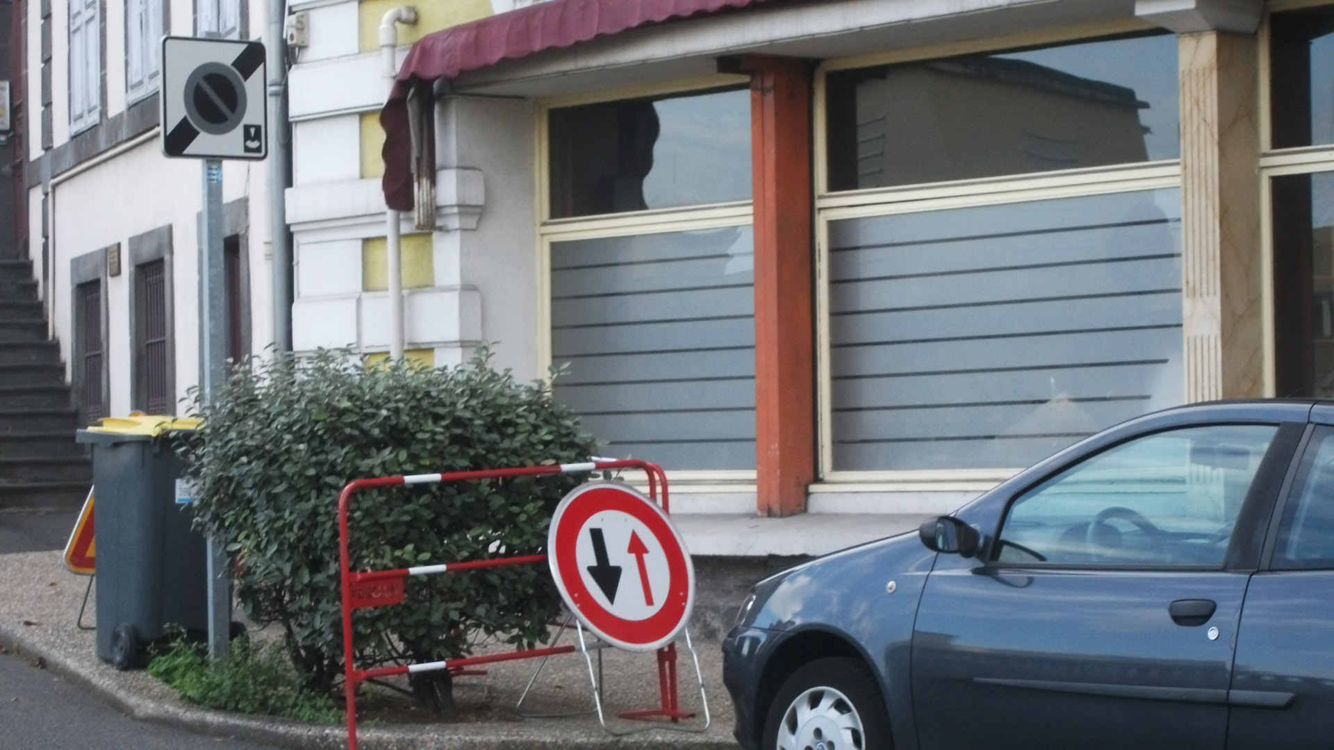 Stationnement à durée limitée avec contrôle par disque (nouveau panneau). Sortie. Signaux Girod 2009